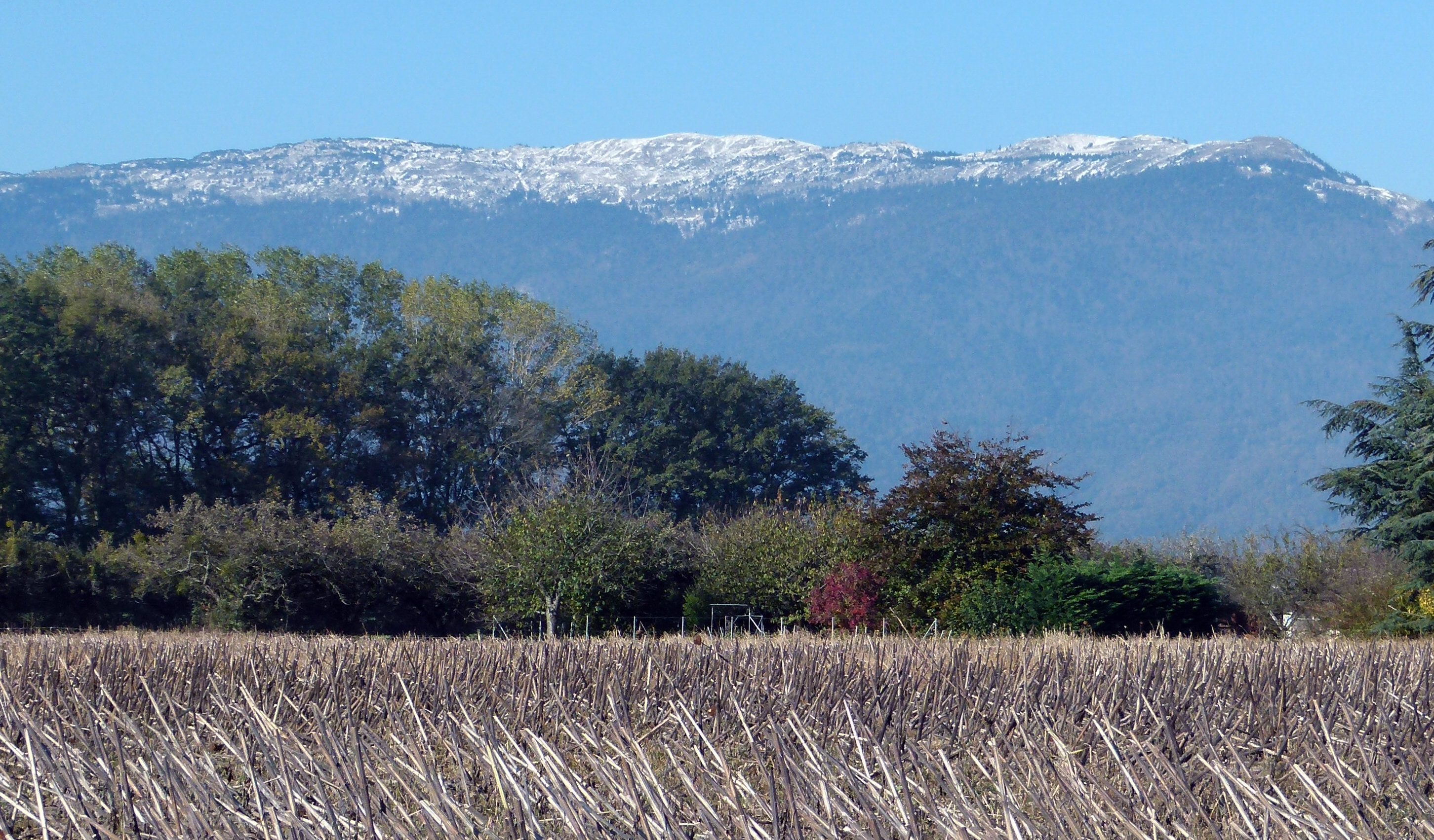 Blick auf den Crêt de la Neige von Prévessin-Moëns aus